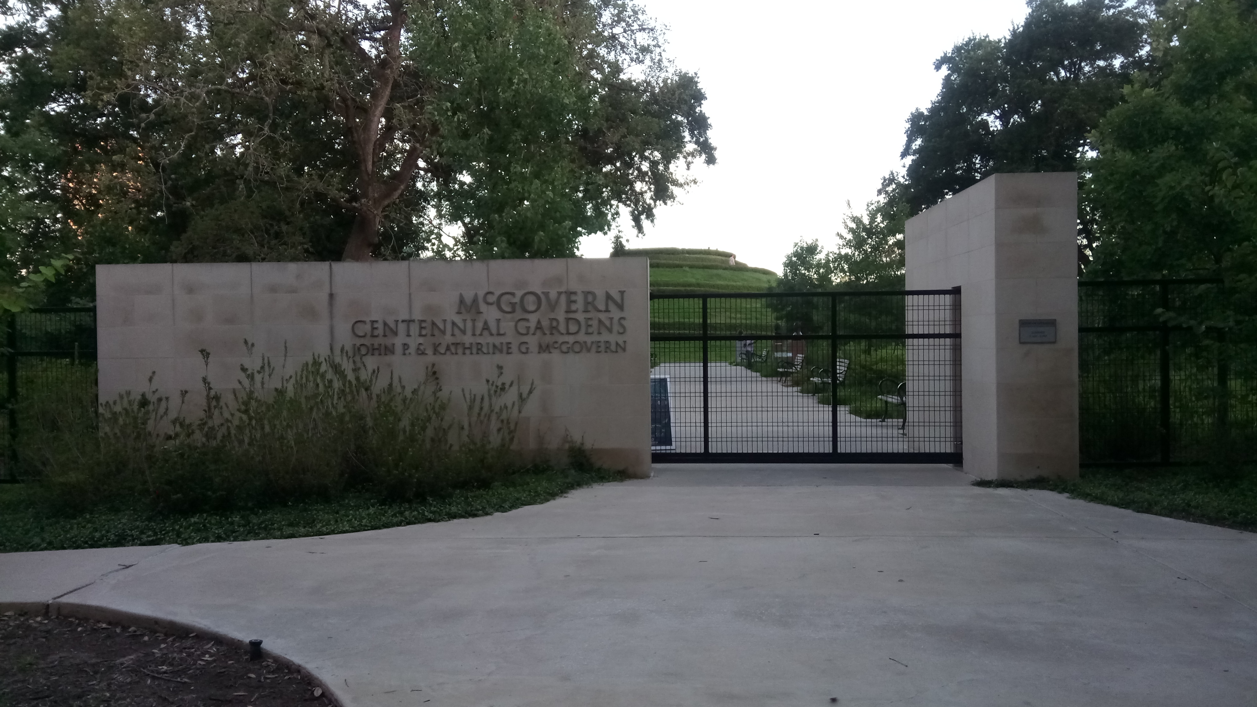 McGovern Centennial Gardens